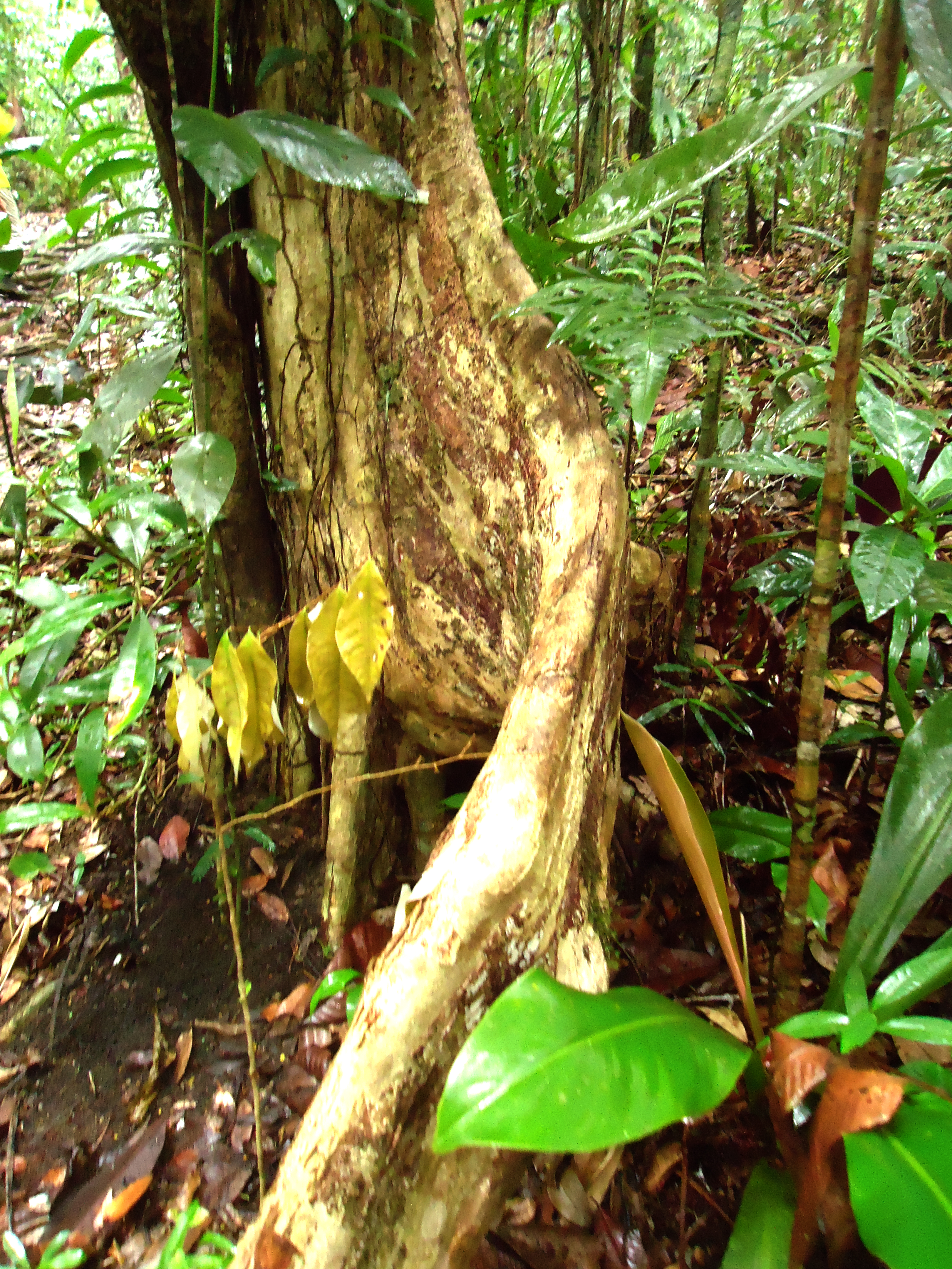 Gindiba no interior da floreste no Parque Estadual. Usada pelos aborígens para se comunicar